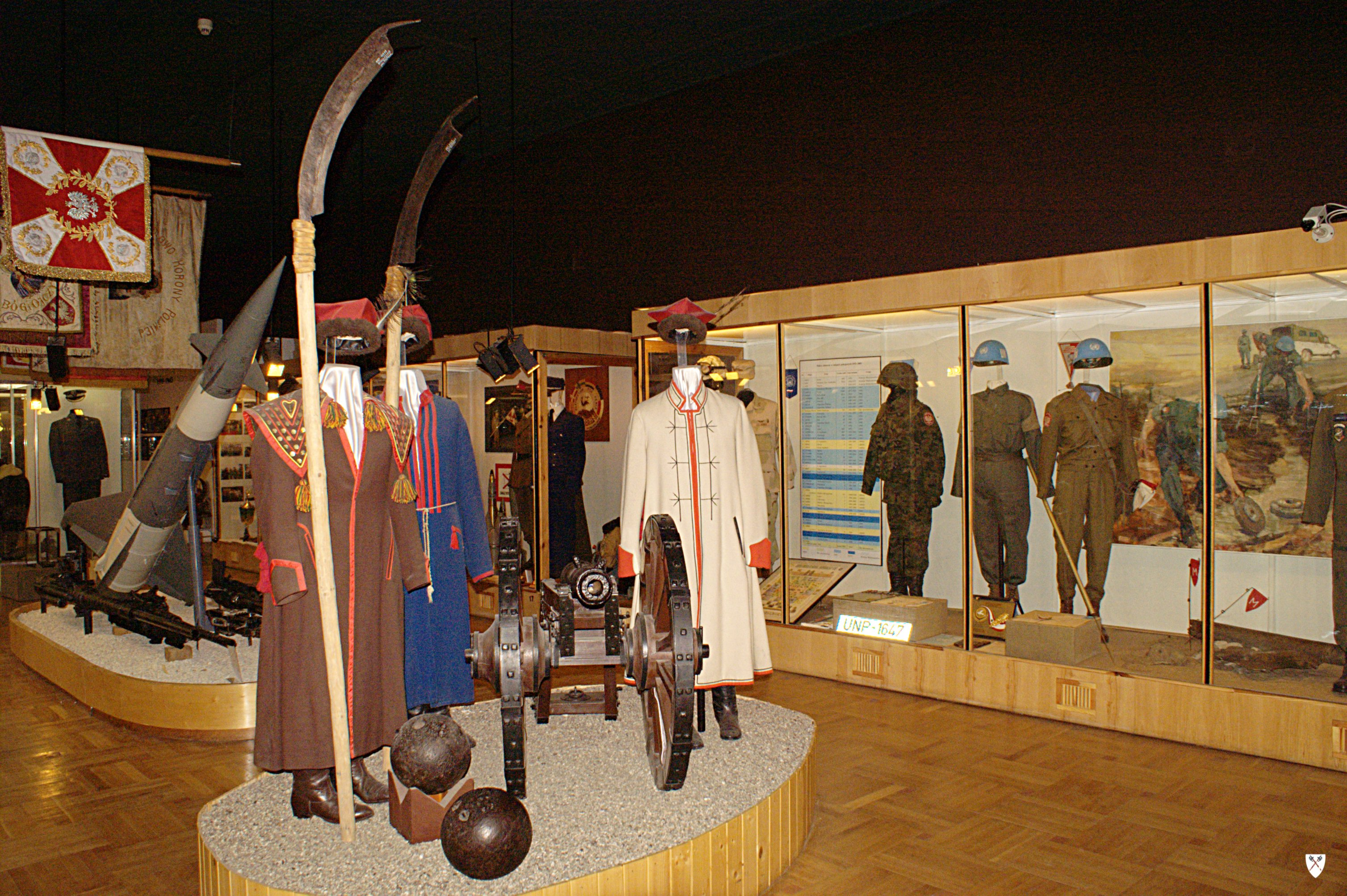 Kosynierzy w Pomorskim Muzeum Wojskowym.